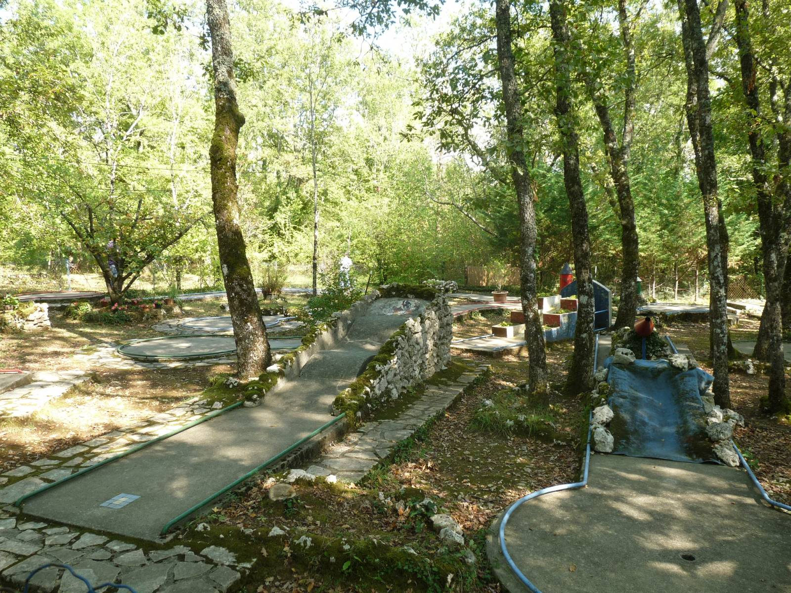 Mini-golf des grottes du Quéroy (16), France